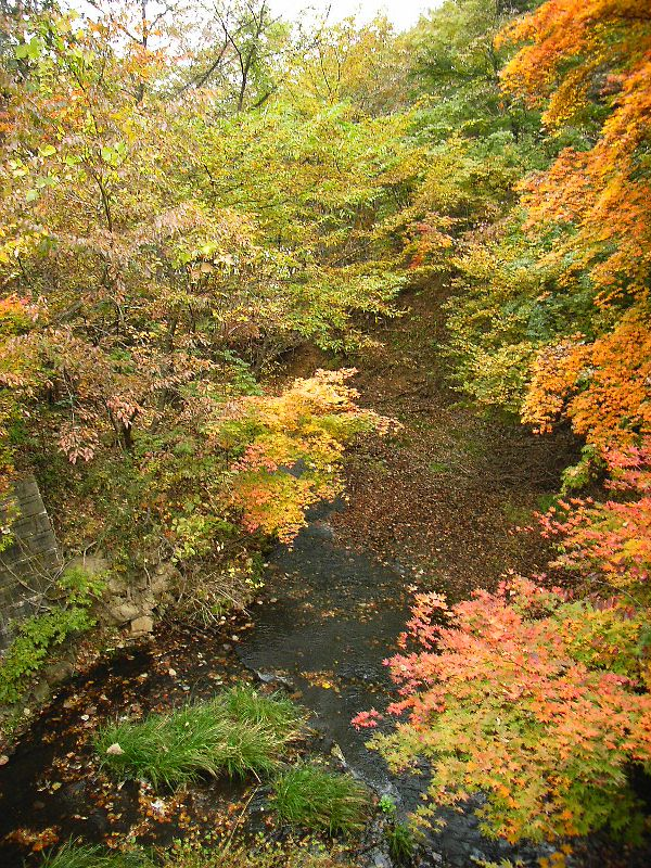 Saikachi River. Sendai, Miyagi prefecture, Japan.